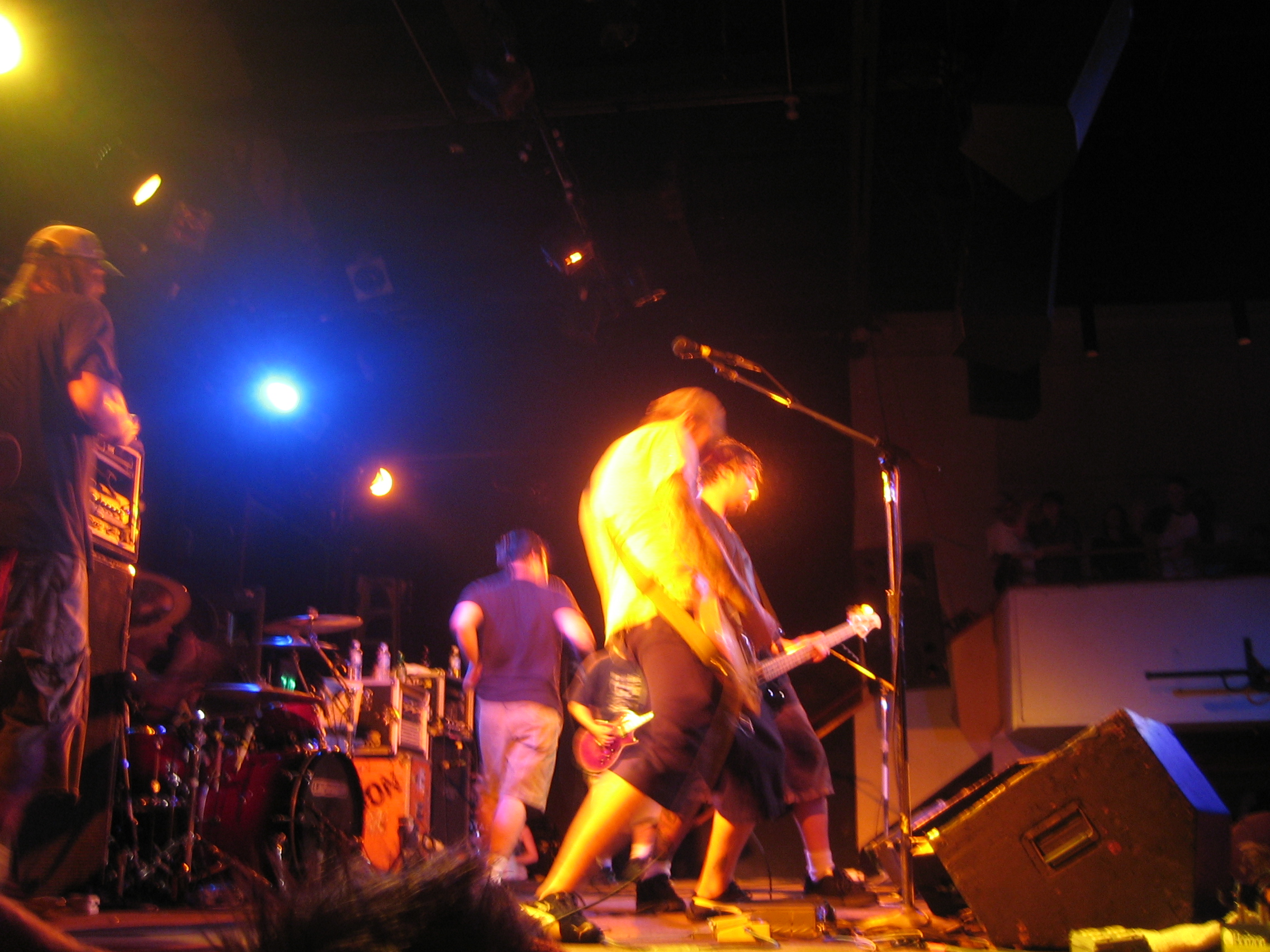 Lagwagon in concert